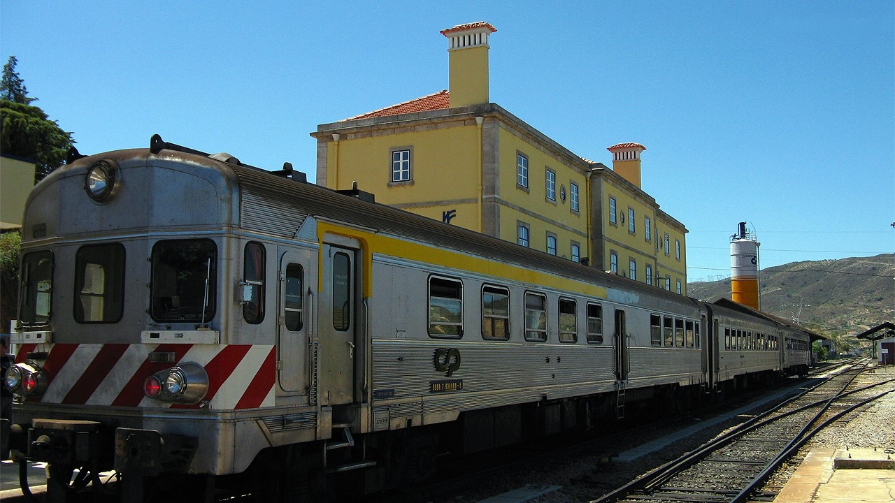 UTD 609